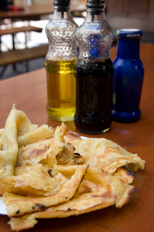 Une portion de socca dans un bistro niçois.